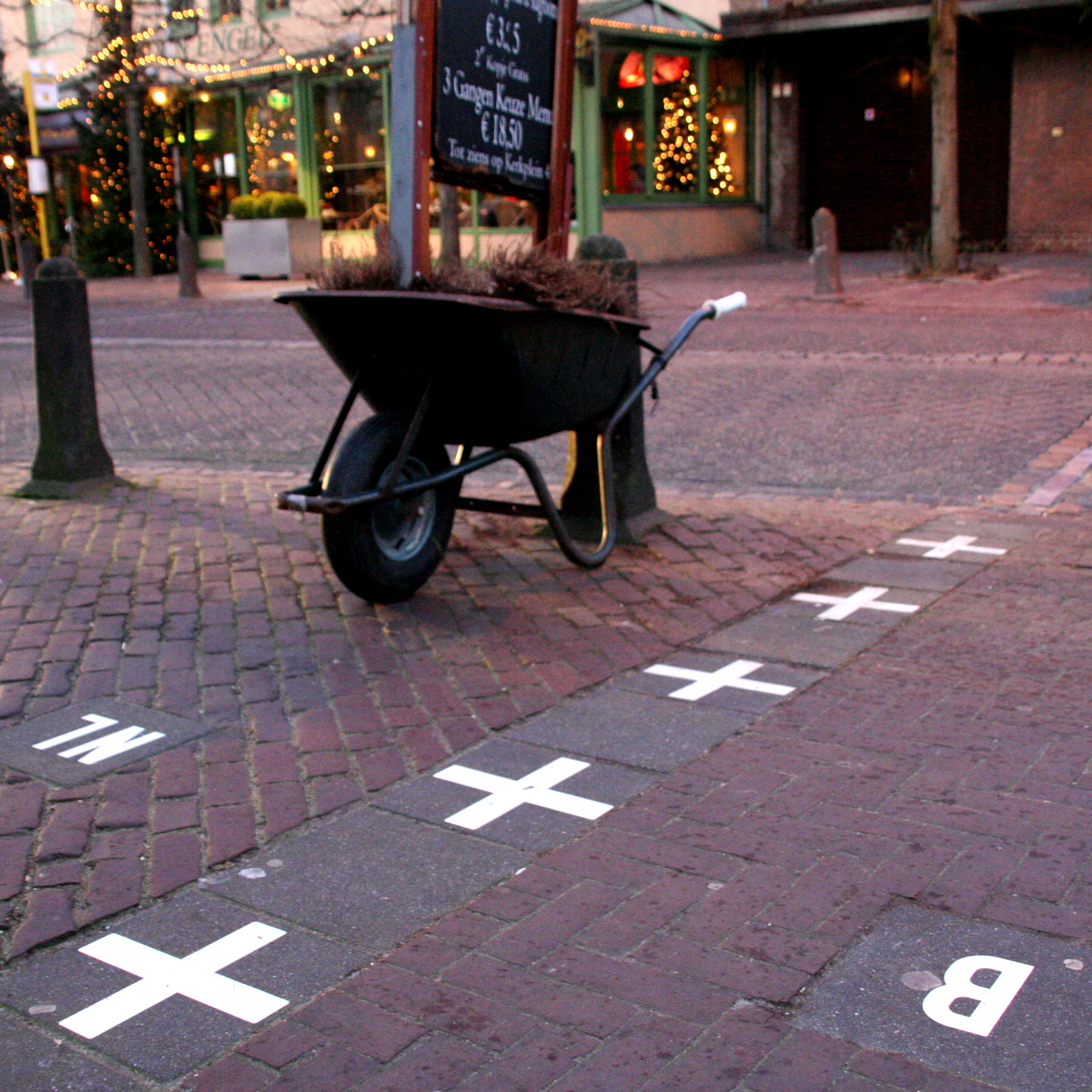 The Baarle border between Baarle-Nassau and Baarle-Hertog